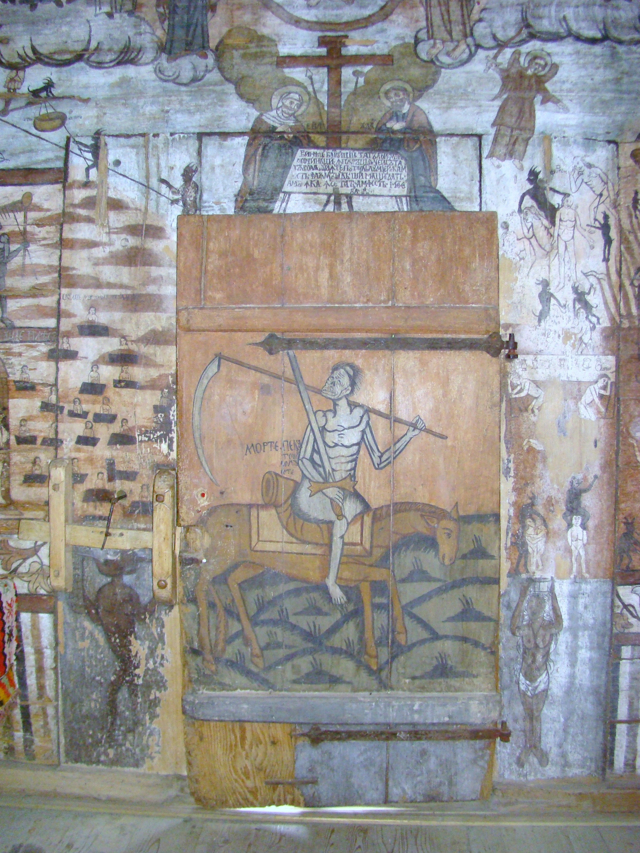 Biserica de lemn "Sfântul Nicolae", sat BOGDAN VODĂ